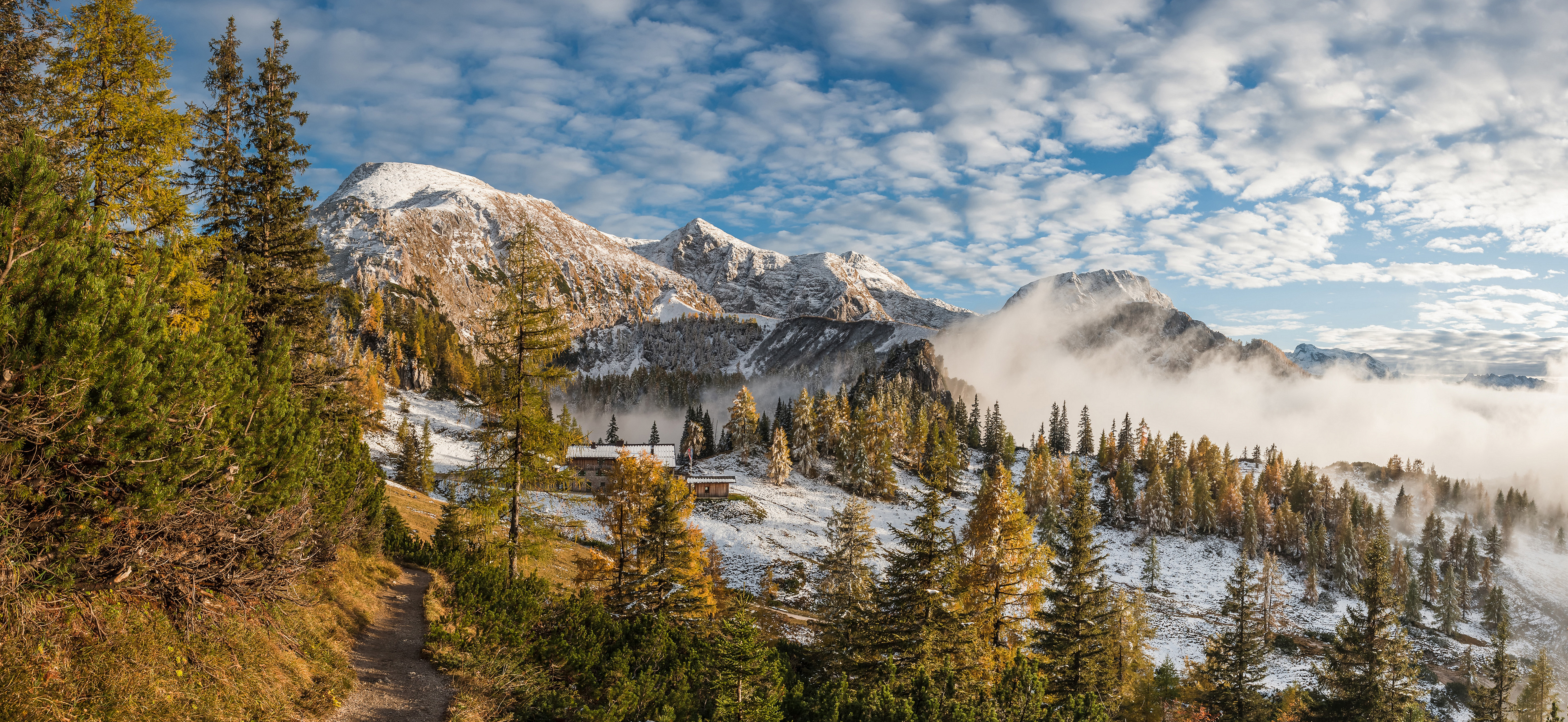 Landschaft im Nationalpark Berchtesgaden